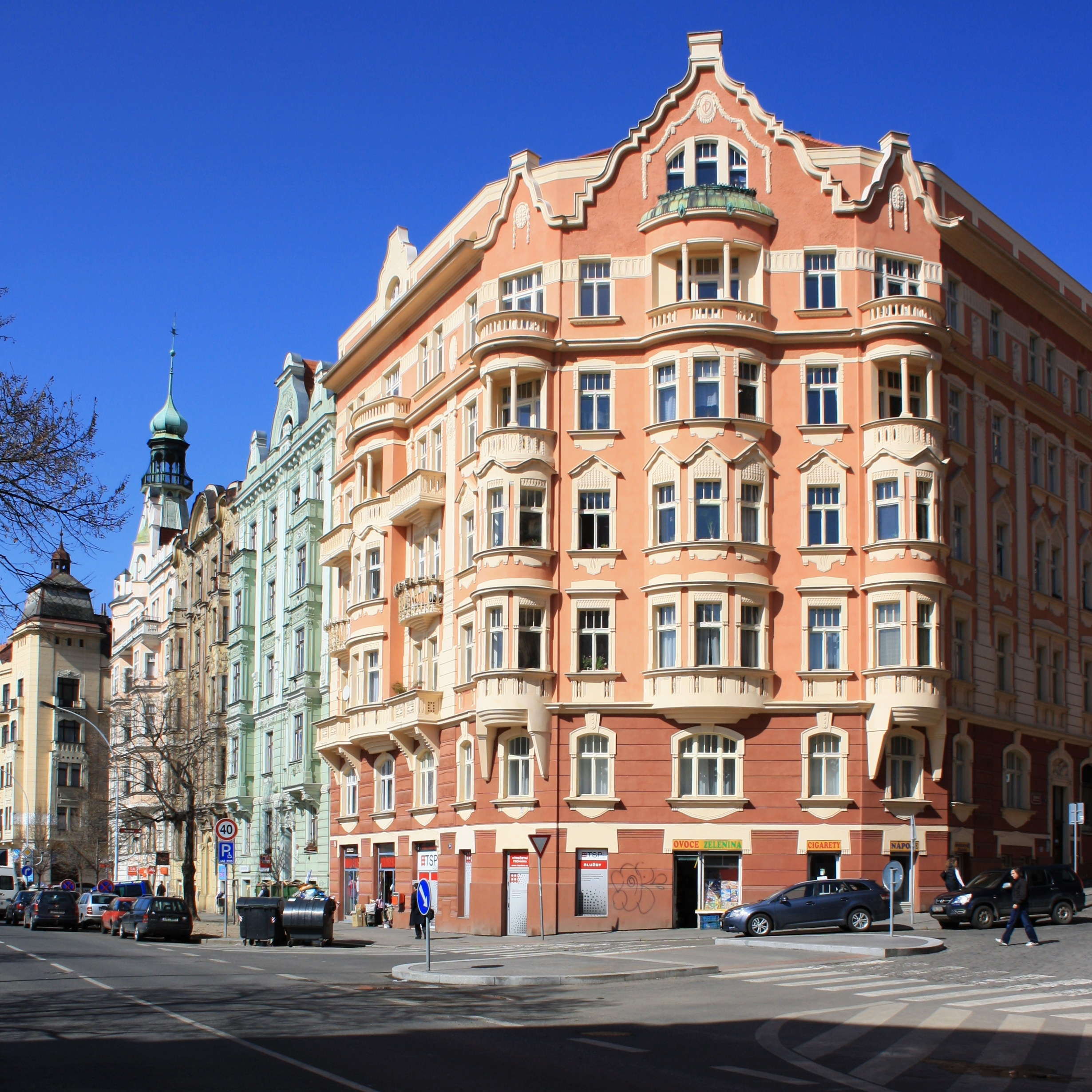 Praha, Vršovice - Kodaňská č. p. 582 (nároží s Finskou)